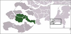 Kaart van Zuid-Beveland, gemaakt uit sjabloon van Wikipedia-gebruiker Mtcv